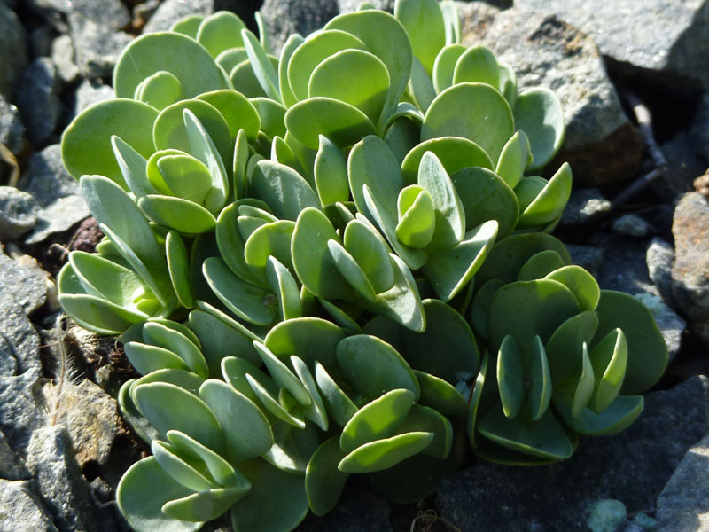 Aethionema oppositifolium